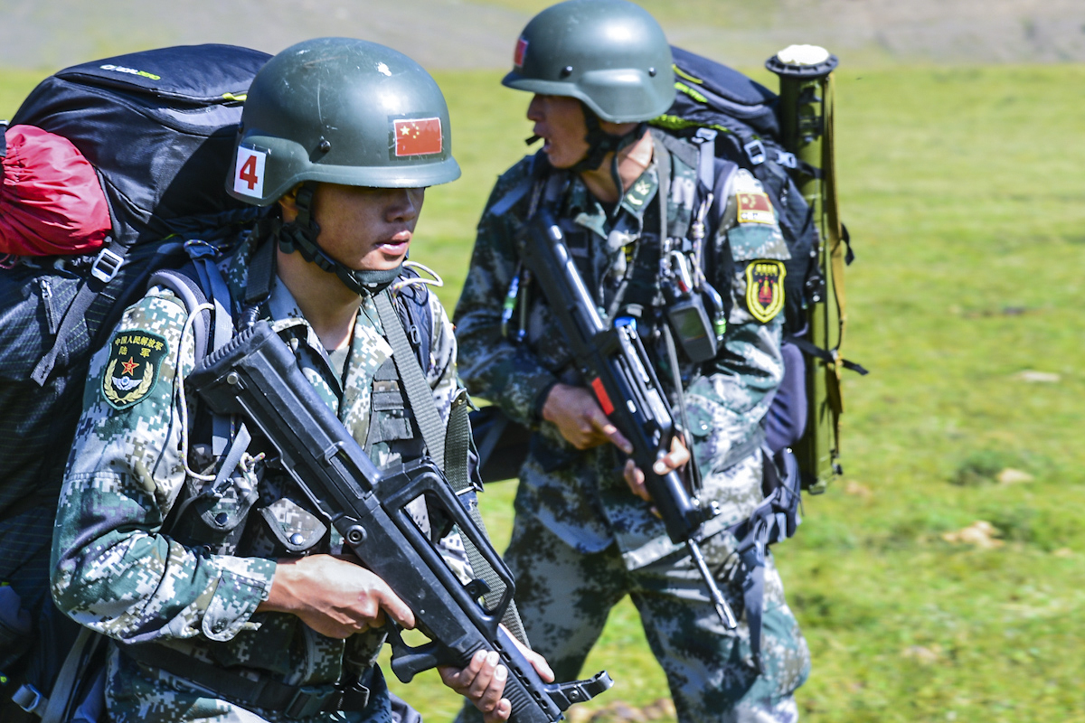 Десантирование участников конкурса «Эльбрусское кольцо» с вертолетов Ми-8 с последующим совершением горного марша (полигон Терскол, Кабардино-Балкария)